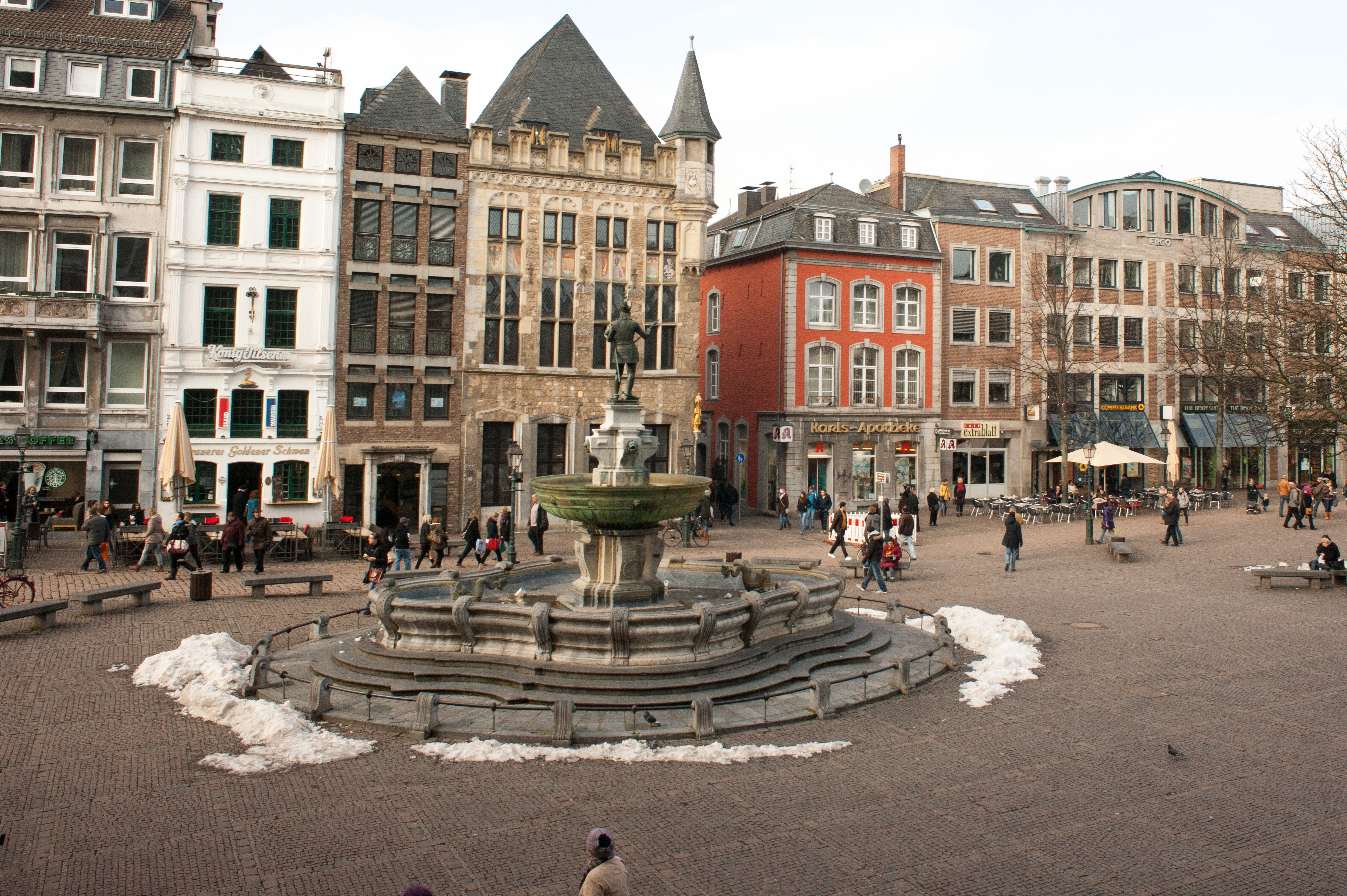 Markt vor dem Aachener Rathaus